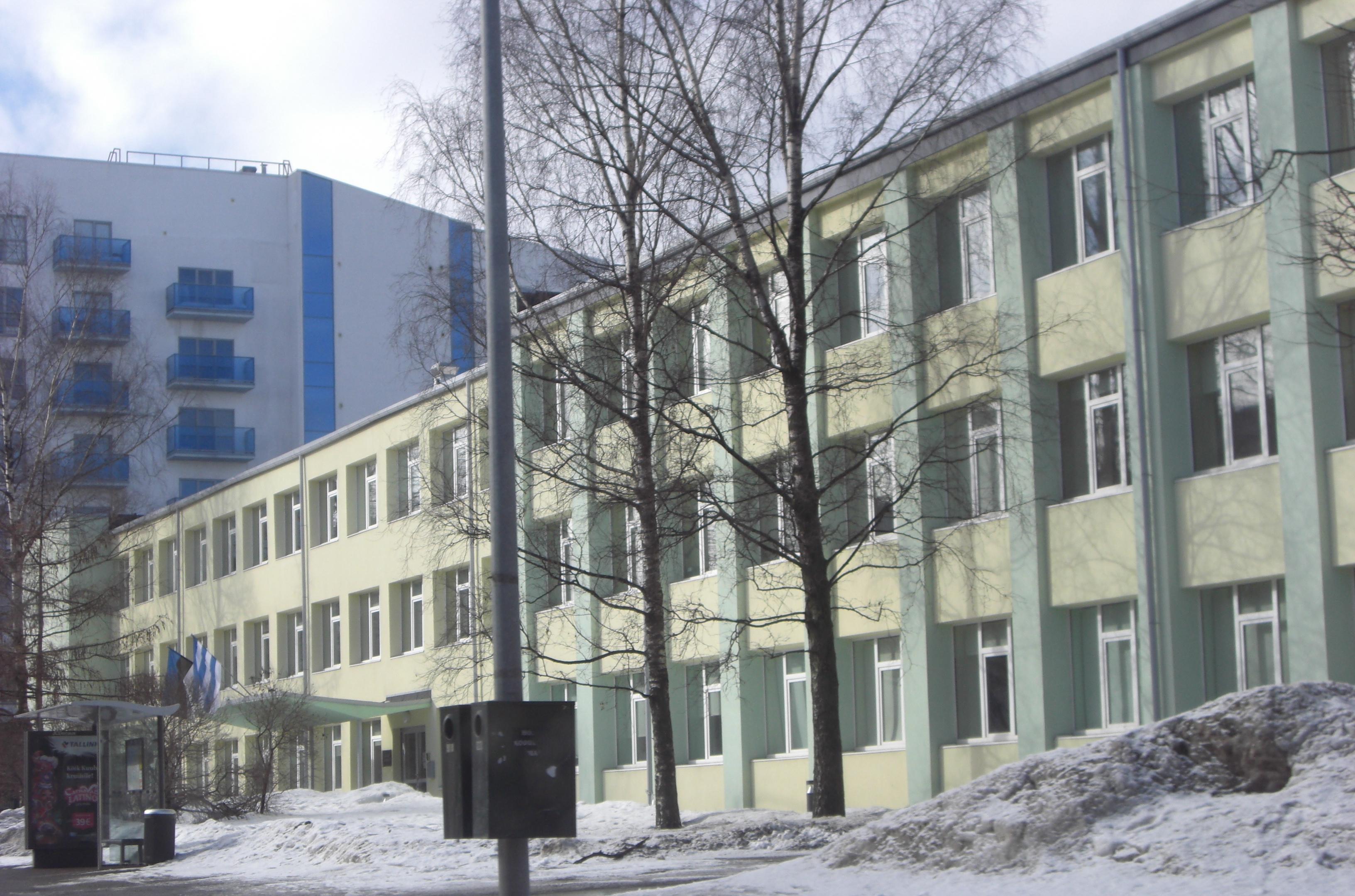 Südalinna Kool, Liivalaia 23